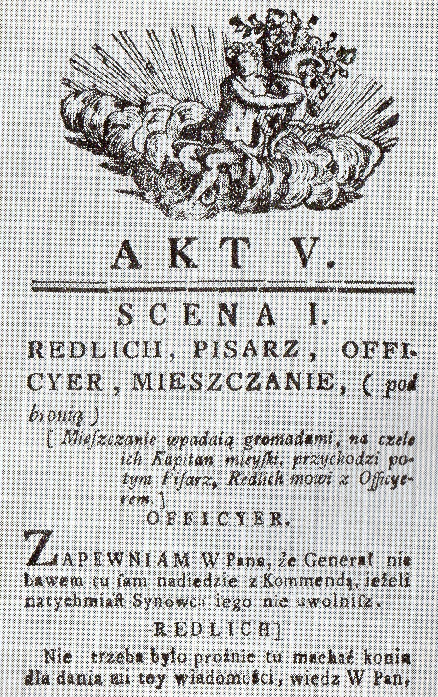 Stronnica pierwodruku Burmistrza poznańskiego autorstwa Jana Baudouina.